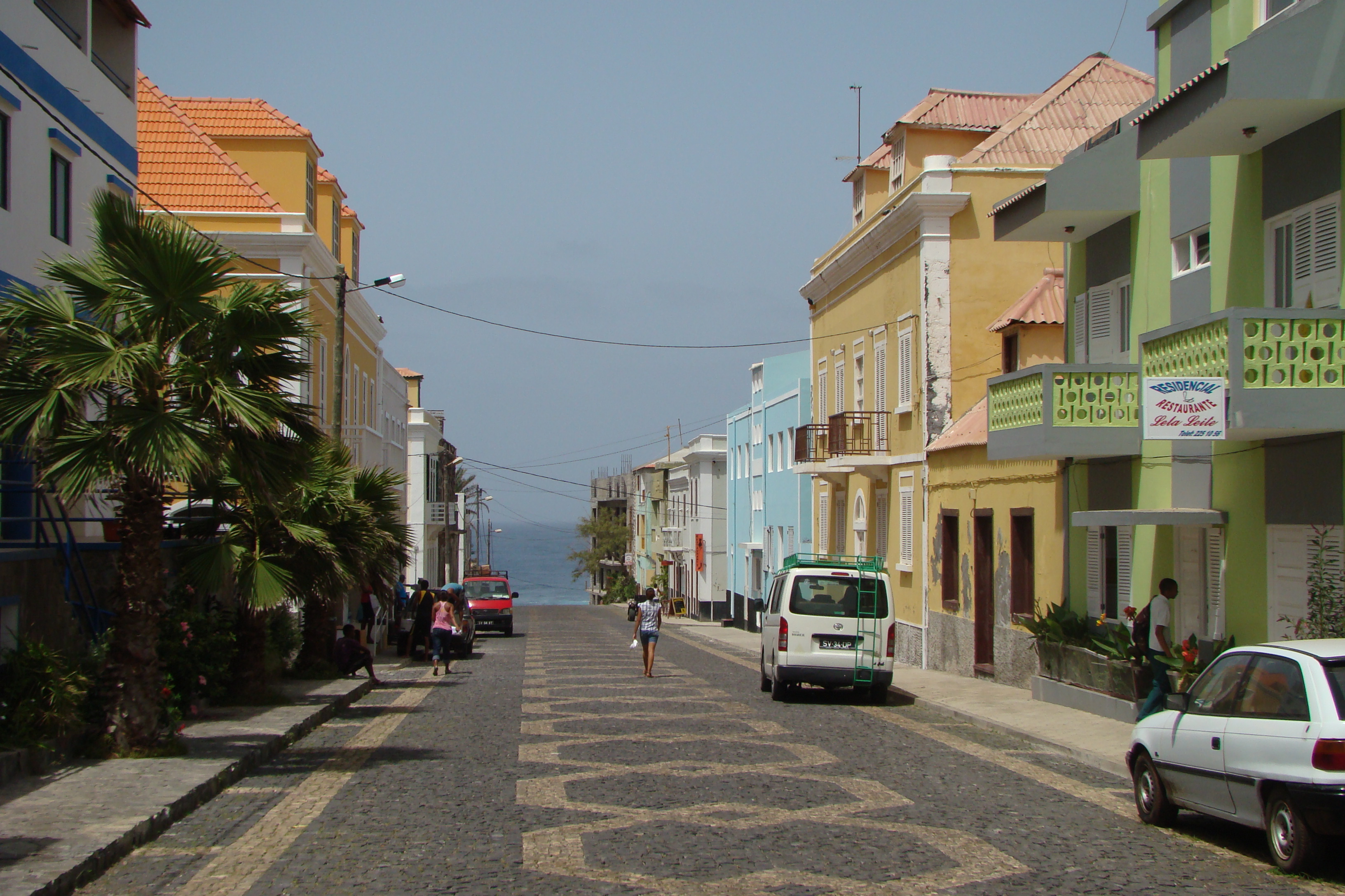 Calle del puerto, en el casco antiguo de Ponta do Sol